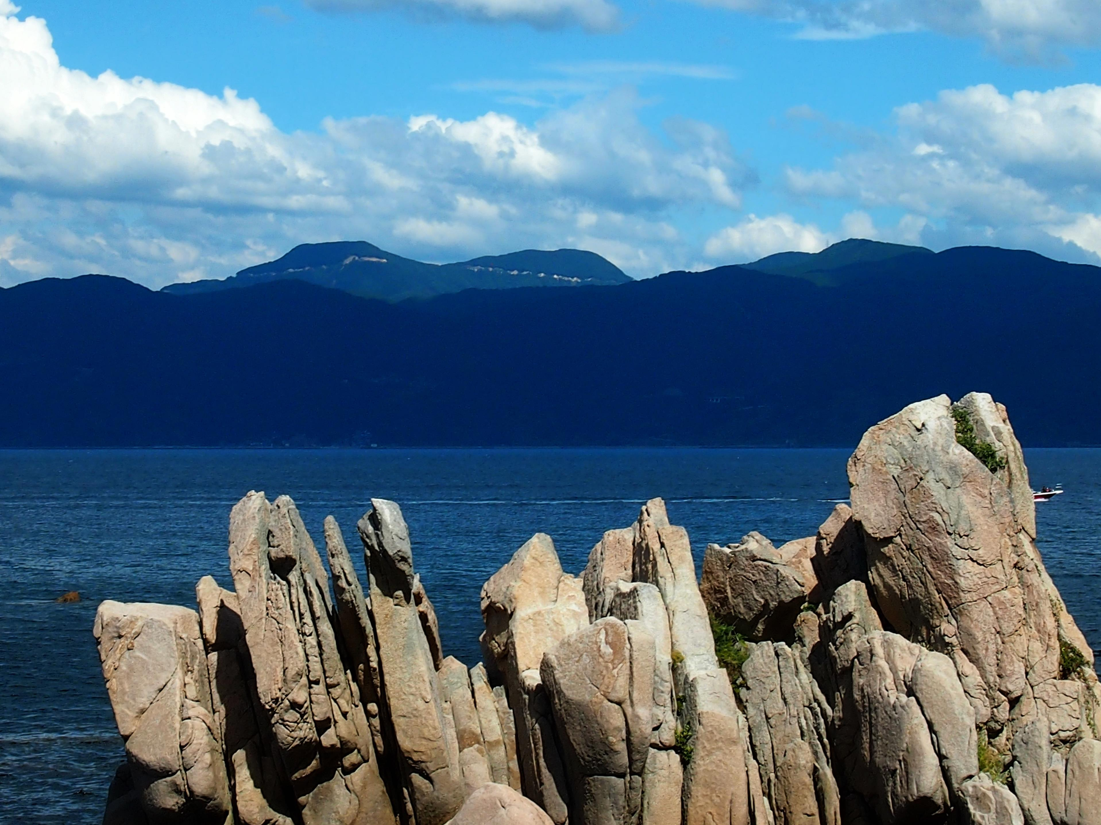 敦賀半島の立石から見たホノケ山、背後の林道が横切る2つのピークの左が山頂。